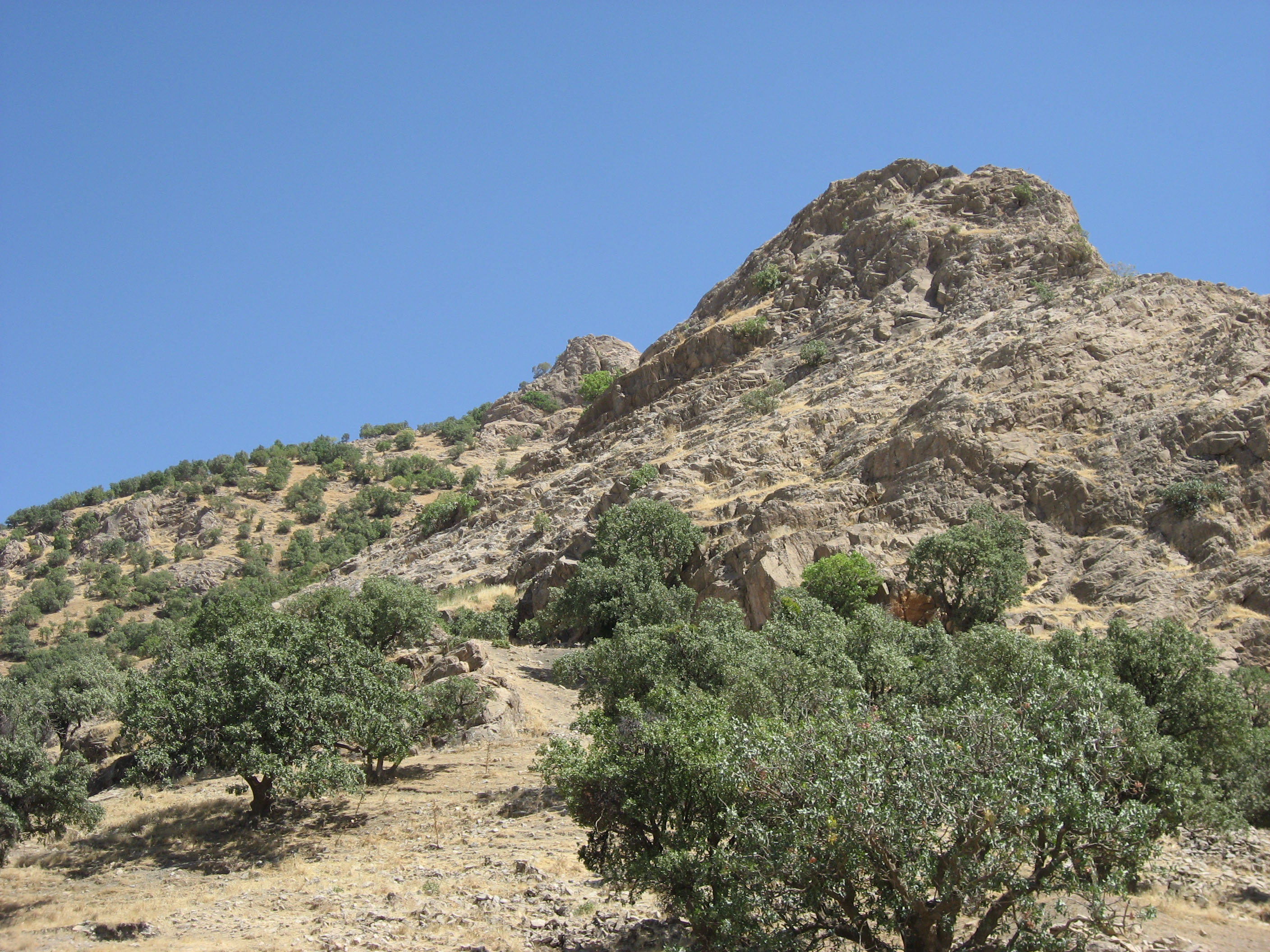 کوردی: دیمەنی قەڵای مەریوان لە لای پاشماوەی مزگەوتە سوورەوە